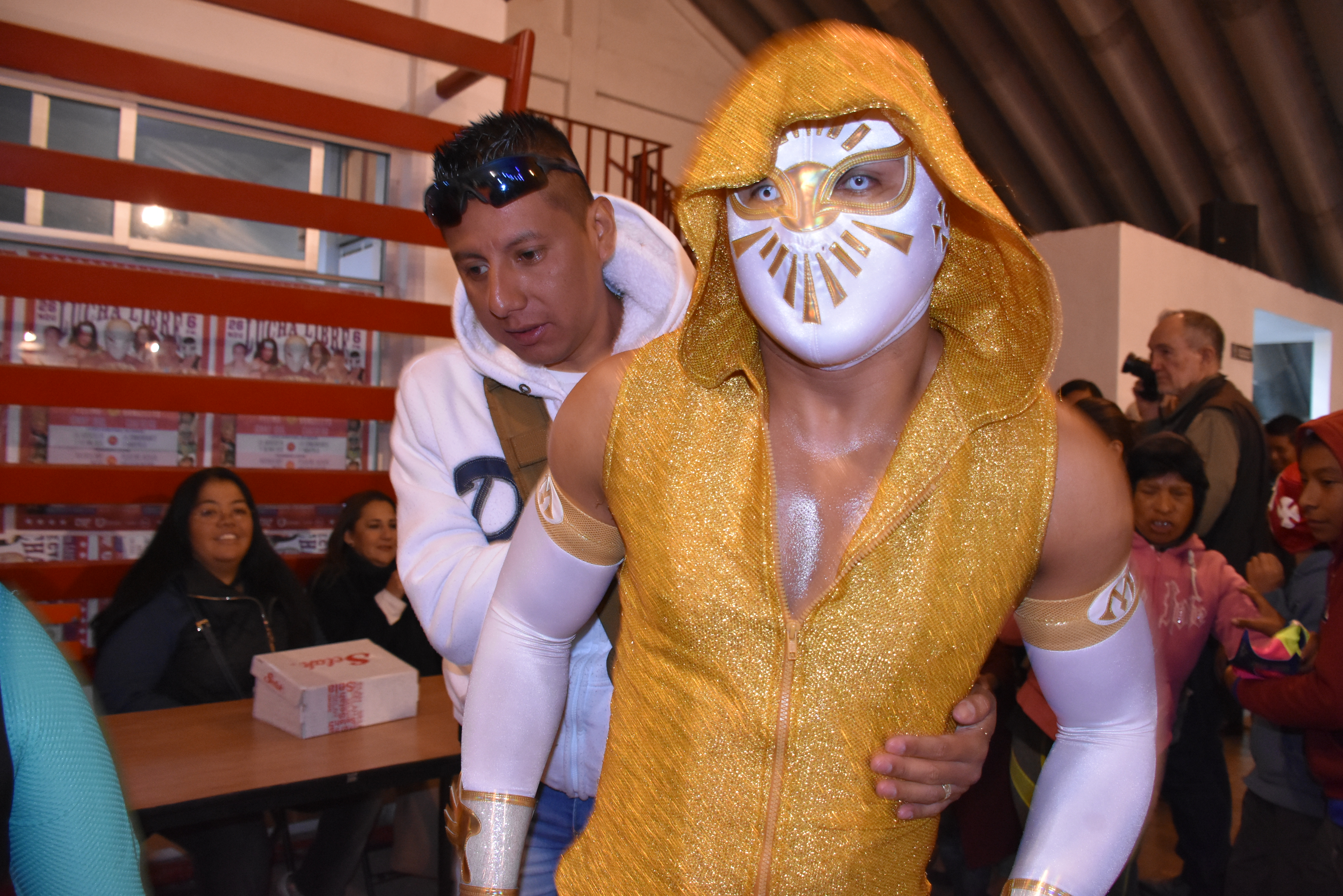 Le catcheur Místico II en 2017.